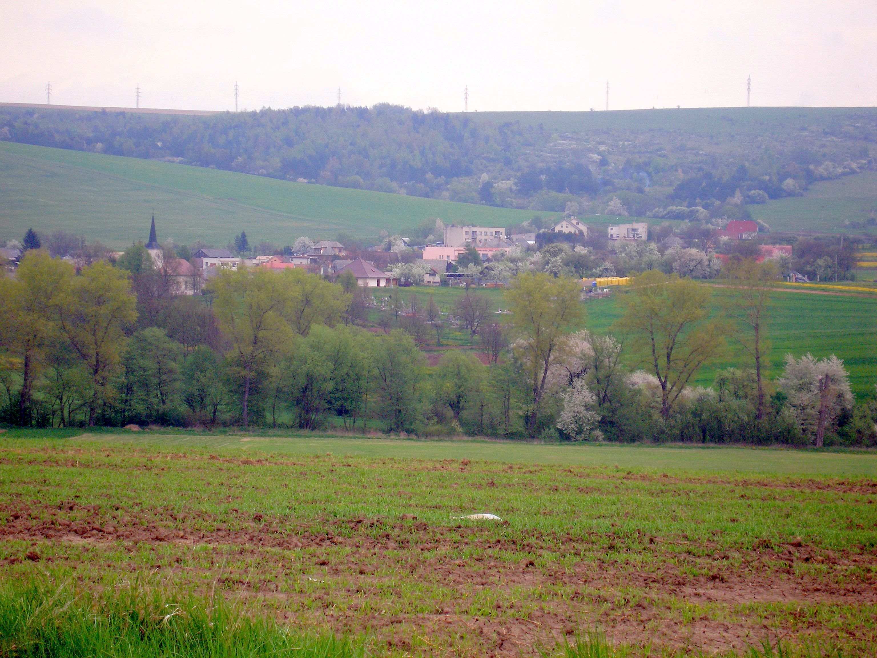 Obec Malý Slivník okres Prešov región Šariš